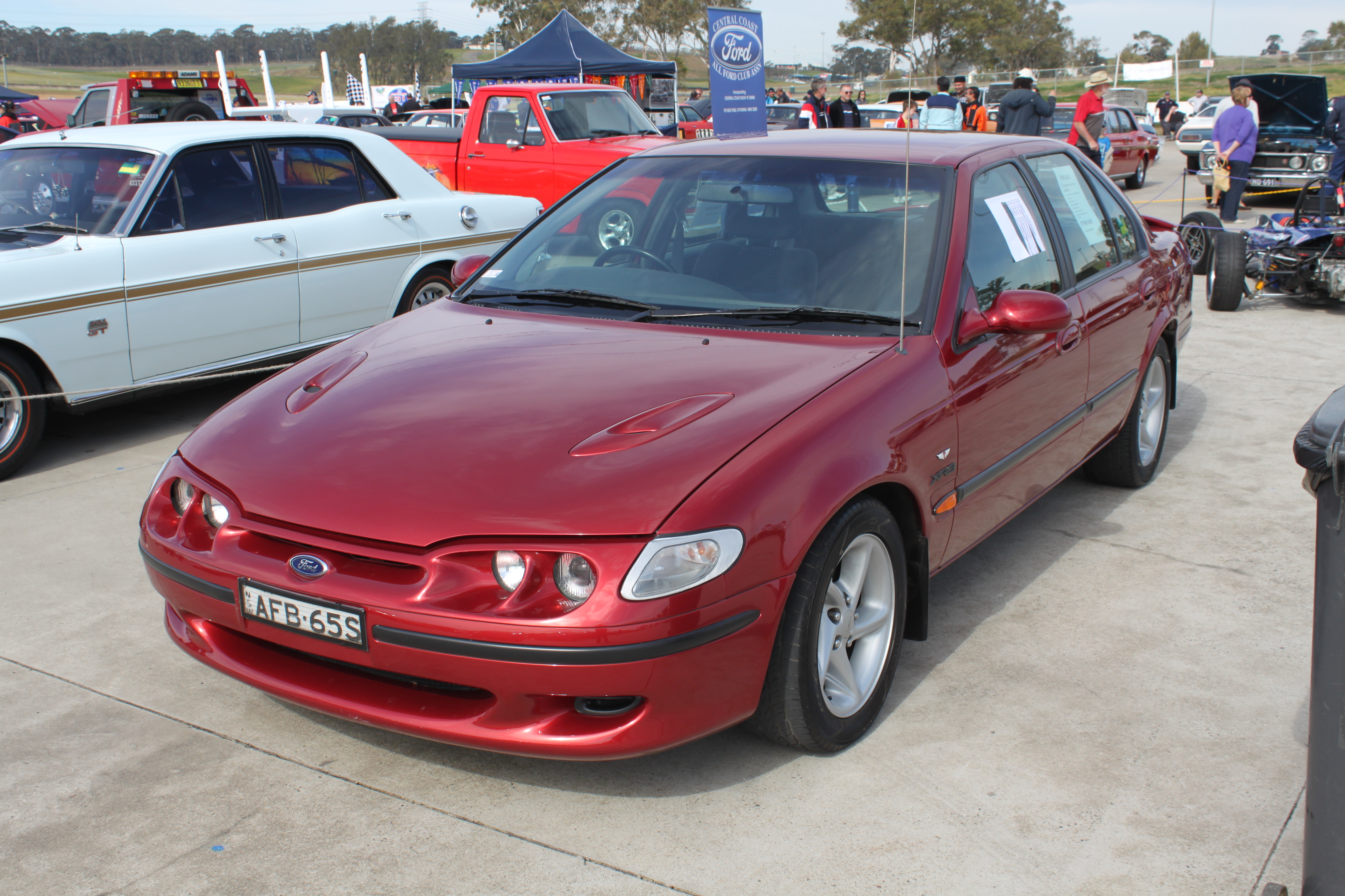 Ford Falcon EL XR8